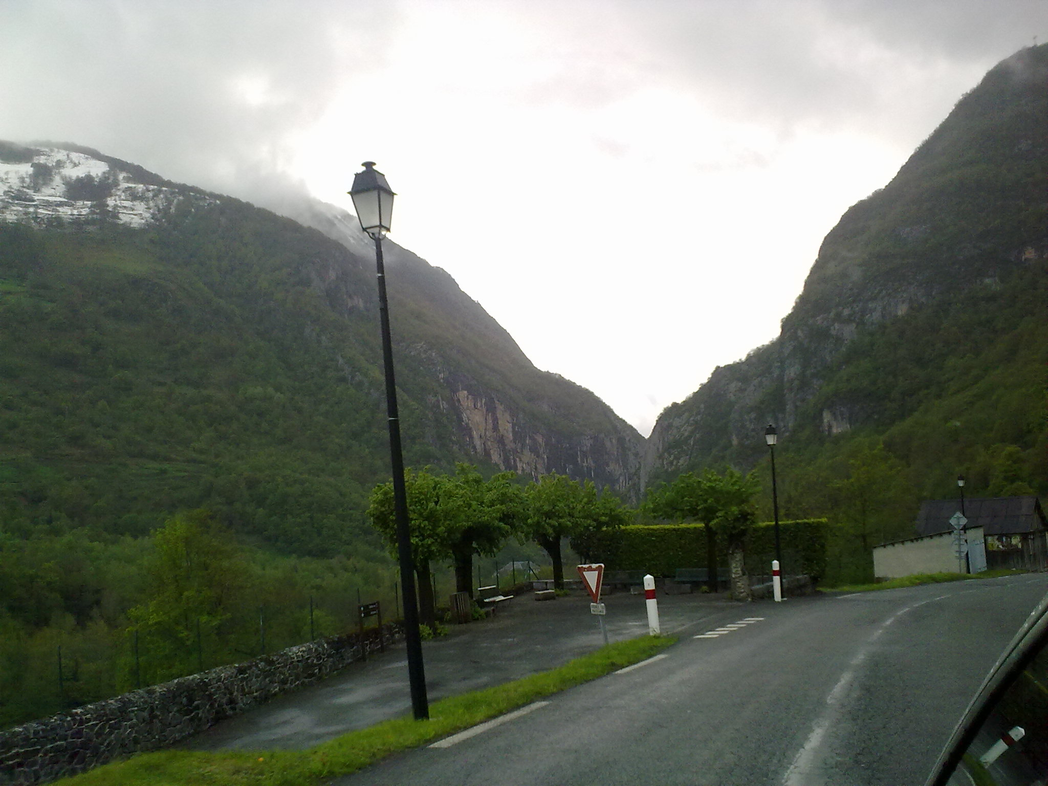 Attention : erreur dans le titre, c'est à Urdos, France